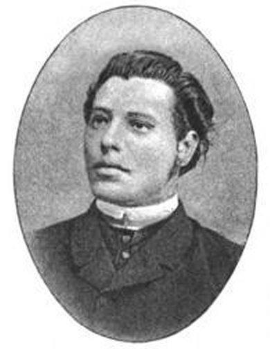 Rudolf Falb (1838-1903). In: Gute Kameraden. Von Peter Rosegger. Wien, Pest, Leipzig, 1893. S. 174